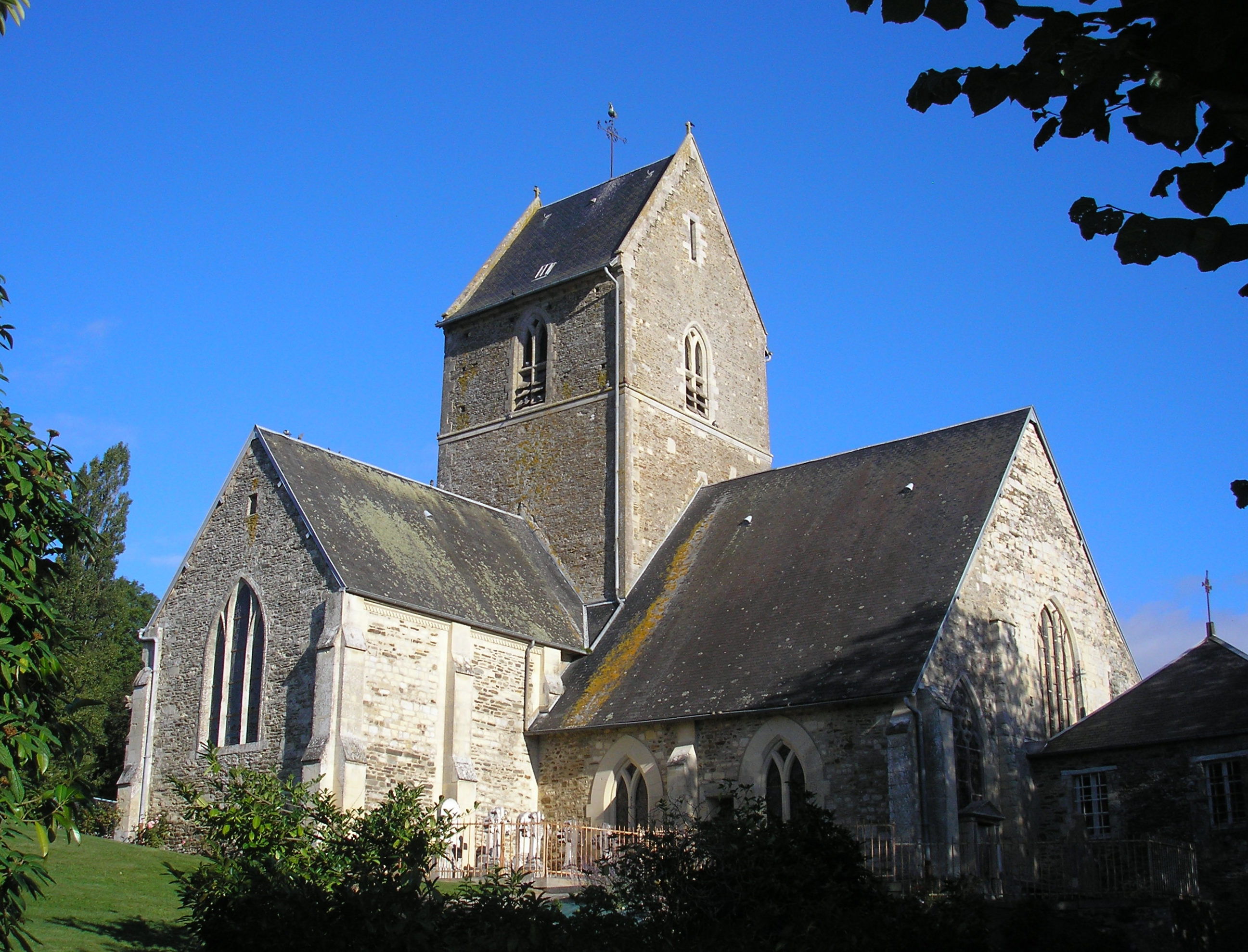 Saint-Georges-d'Aunay (Normandie, France). L'église Saint-Georges.